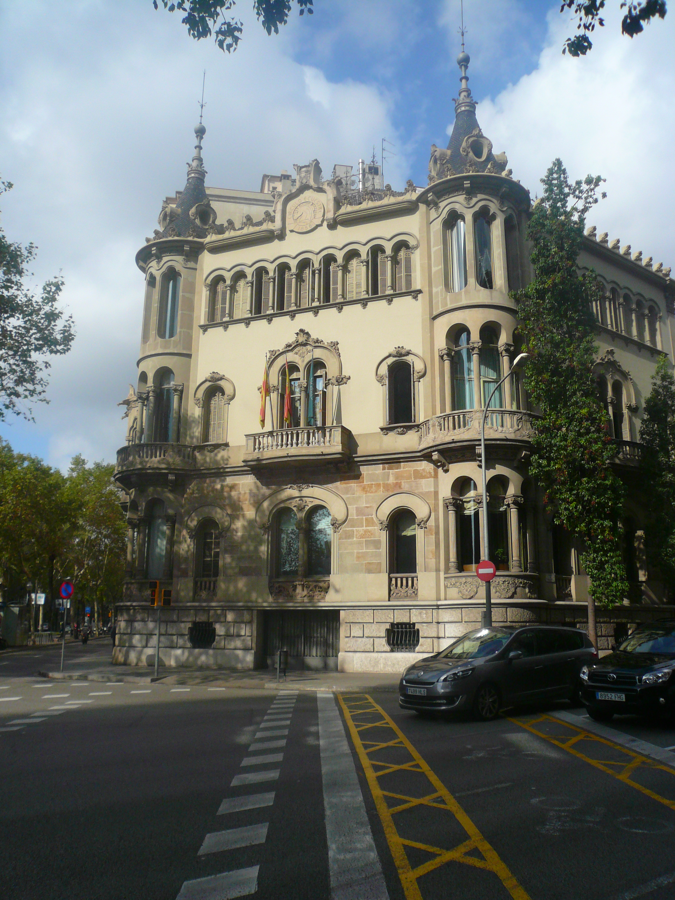 Casa Pérez Samanillo (Barcelona) Object location41° 23′ 44.08″ N, 2° 09′ 14.84″ E